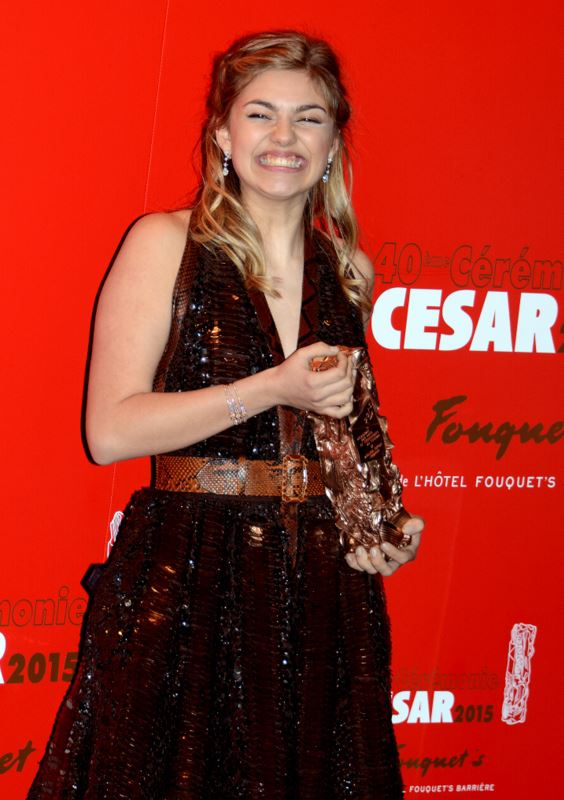 Louane Emera à la cérémonie des César